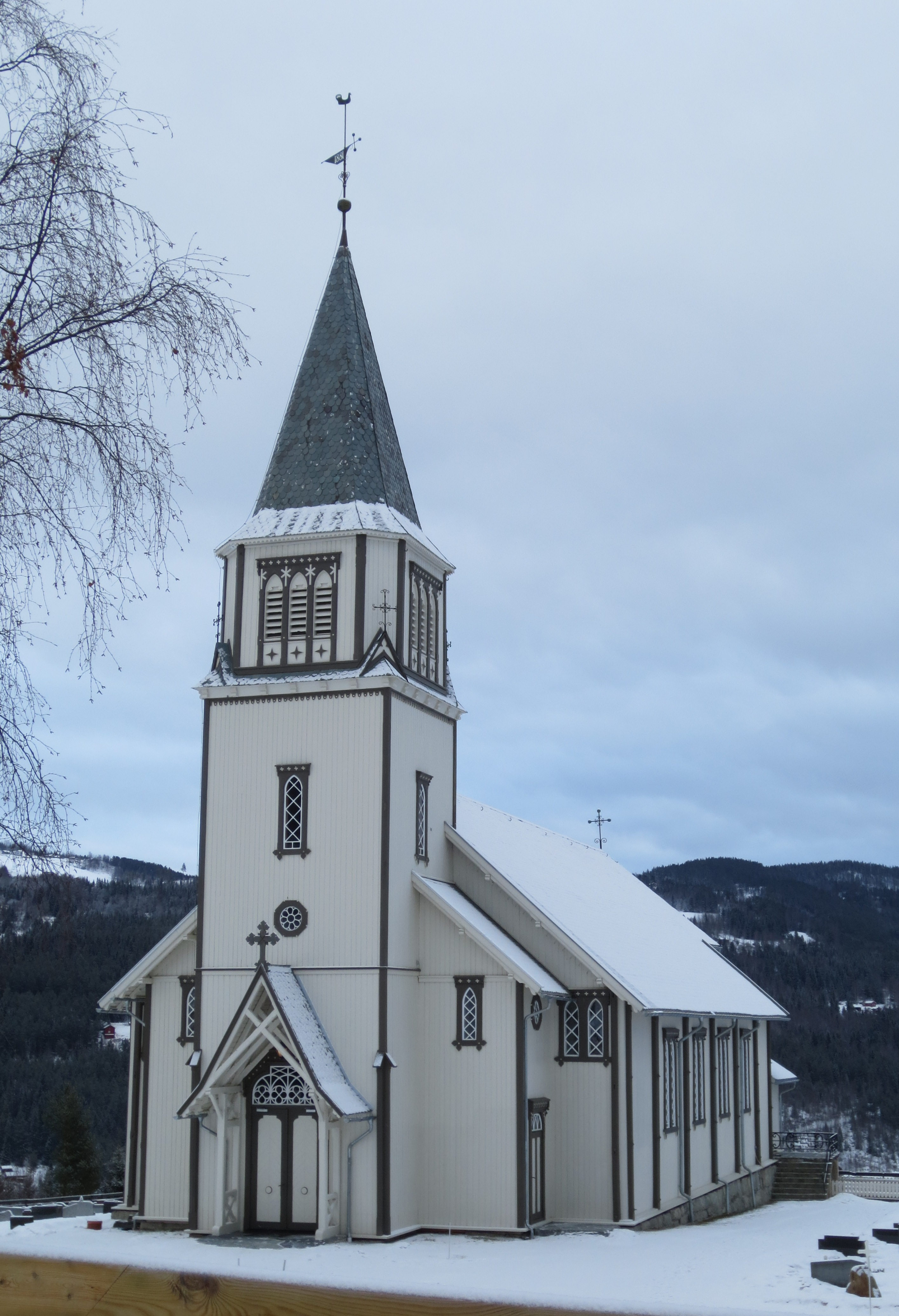 Gol kirke i Hallingdal, Buskerud